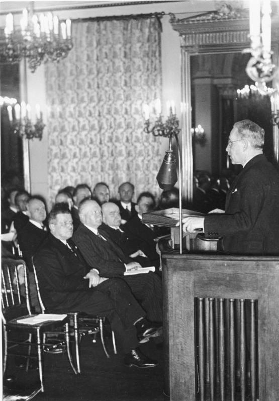 Reichsverkehrsminister Eltz v. Rübenach sprach gestern im Verkehrsministerium vor der Presse über die Gegenwartsaufgaben der Reichsverkehrspolitik etwa 1935/36